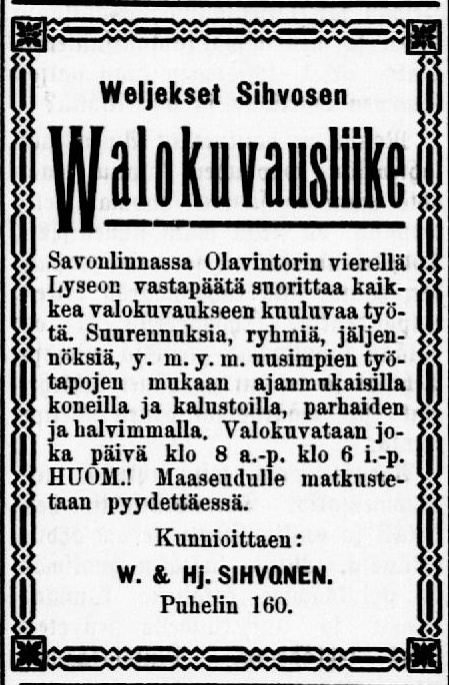 Savonlinnassa Olavintorin vierellä Lyseon vastapäätä suorittaa kaikkea valokuvaukseen kuuluvaa työtä. Suurennuksia, ryhmiä, jäljennöksiä, y. m. y. m. uusimpien työtapojen mukaan ajanmukaisilla koneilla ja kalustoilla, parhaiden ja havimmalla. Valokuvataan joka päivä klo 8 a.-p. klo 6 i.-p- HUOM.! Maaseudulle matkustetaan pyydettäessä. Kunnioittaen: W. & Hj. SIHVONEN. Puhelin 160. 13.07.1910 Parikkalan Sanomat no 28 s. 1